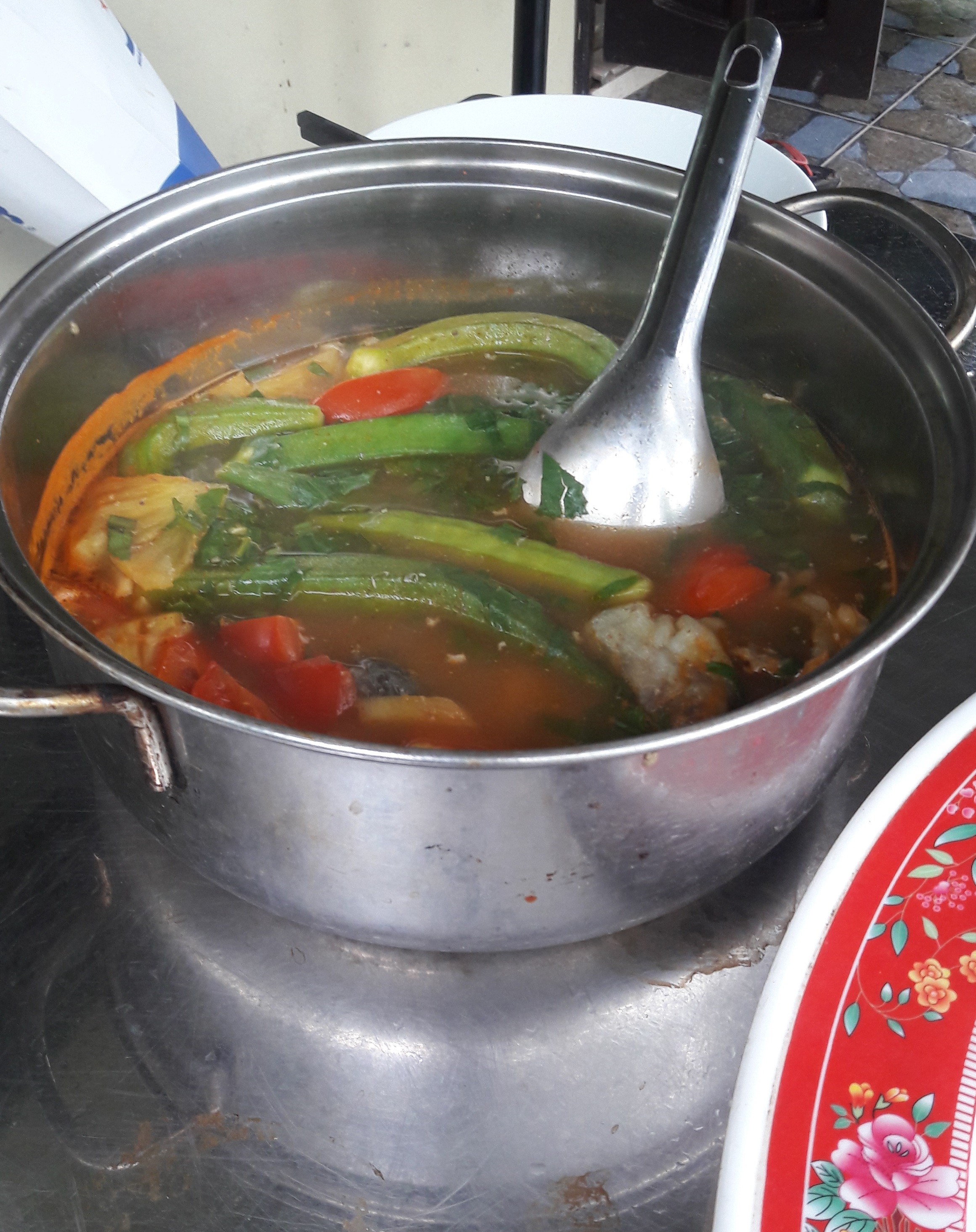 Hình tự chụp bằng máy di động cá nhân về tô canh chua (đã cắt lại)